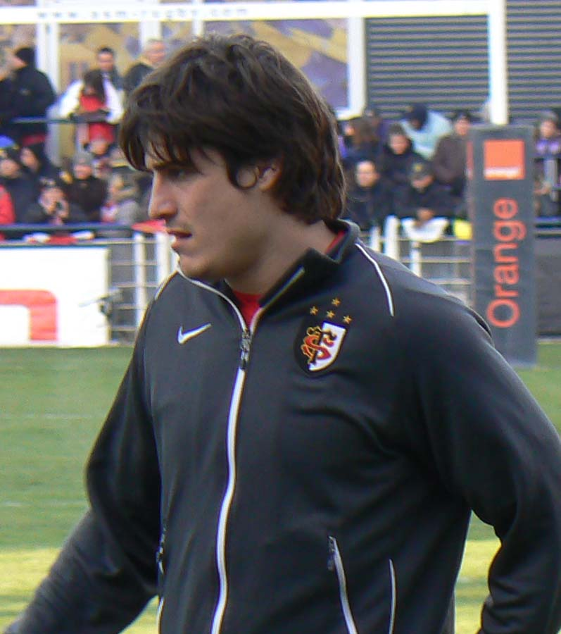 Le rugbyman français international français David Skrela au stade Marcel-Michelin de Clermont-Ferrand.